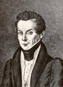 Ксенофо́нт Алексе́евич Полево́й (1801 — 1867) — русский писатель